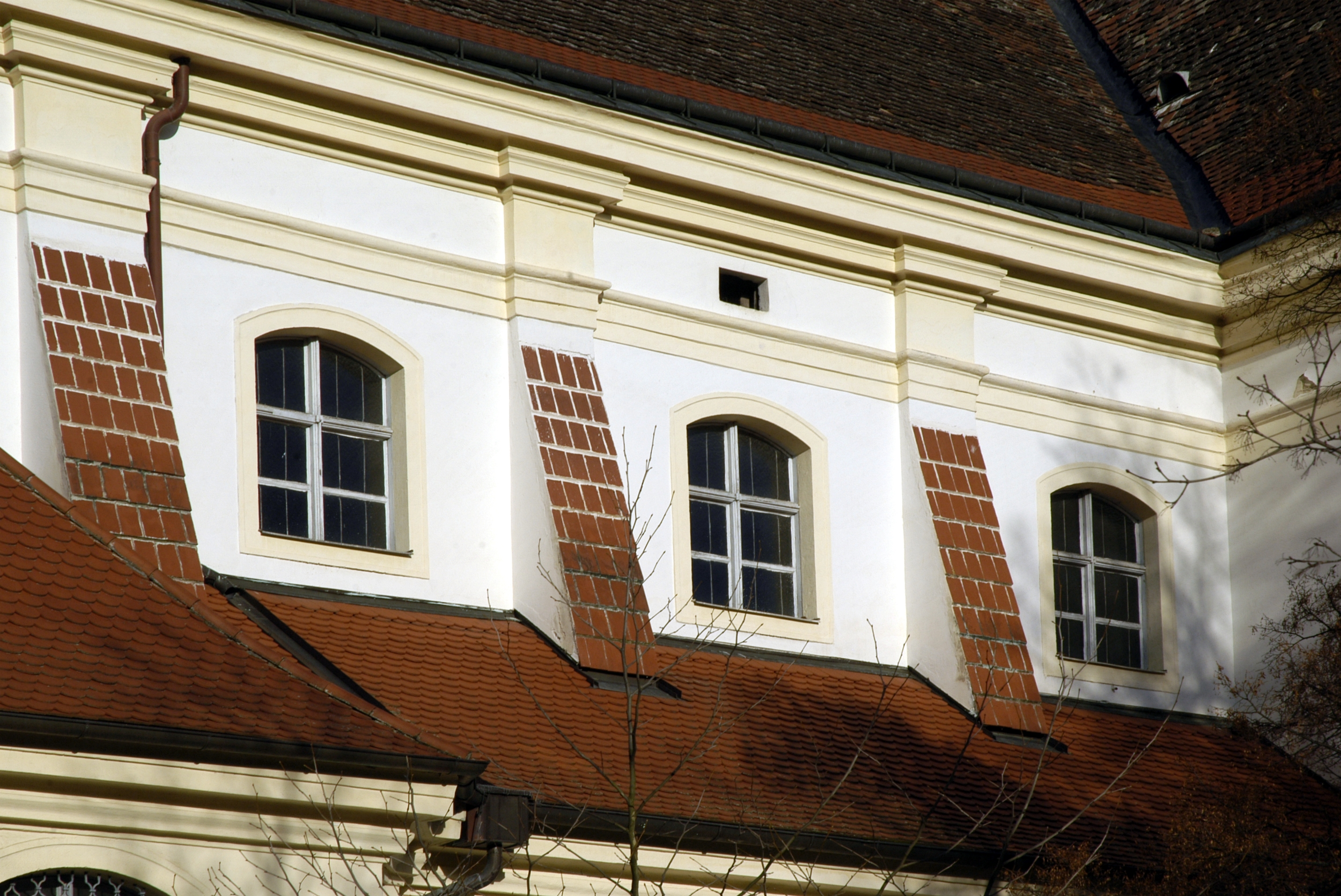 Obergaden an der Südseite